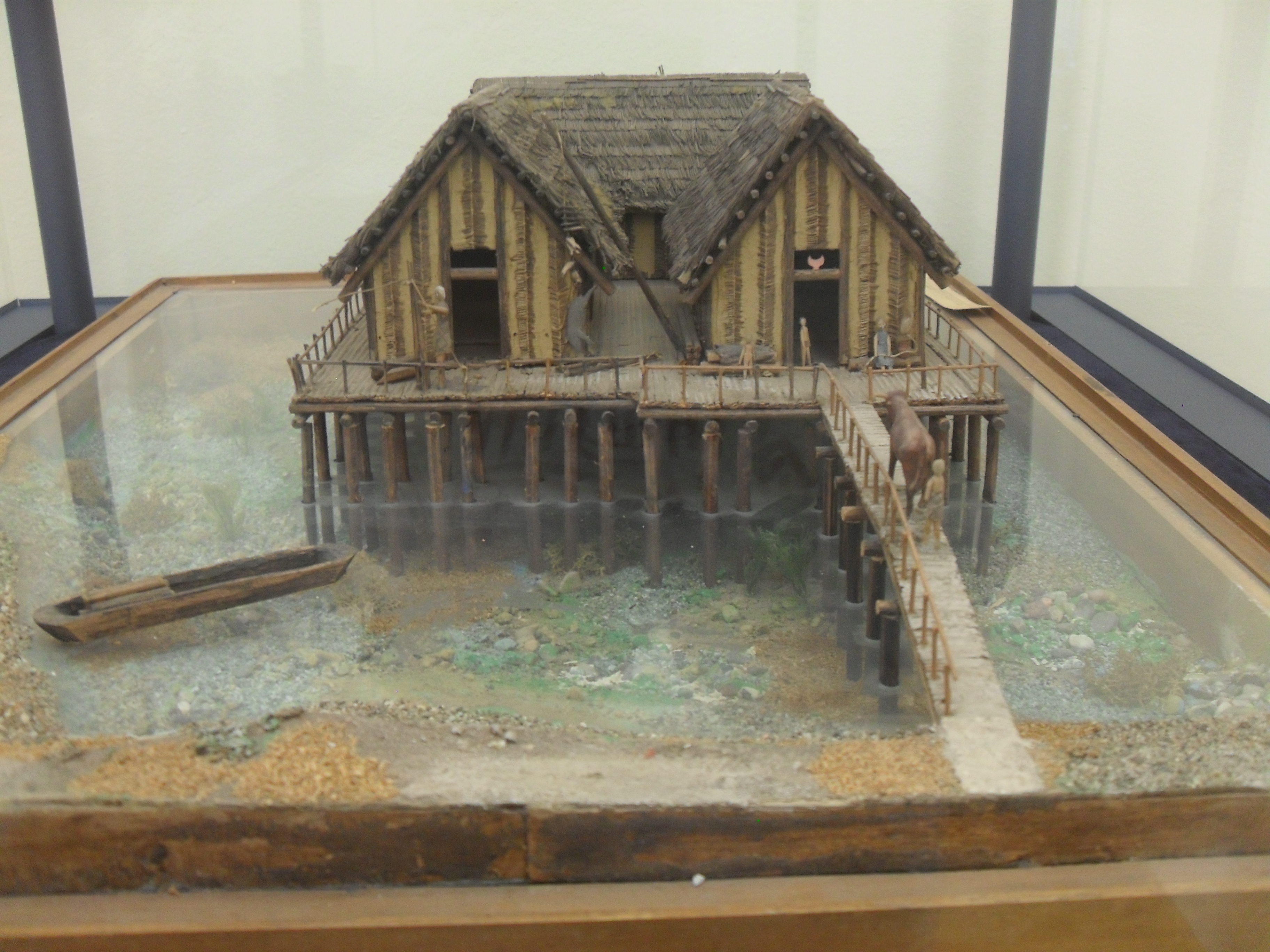 Modellino di palafitta